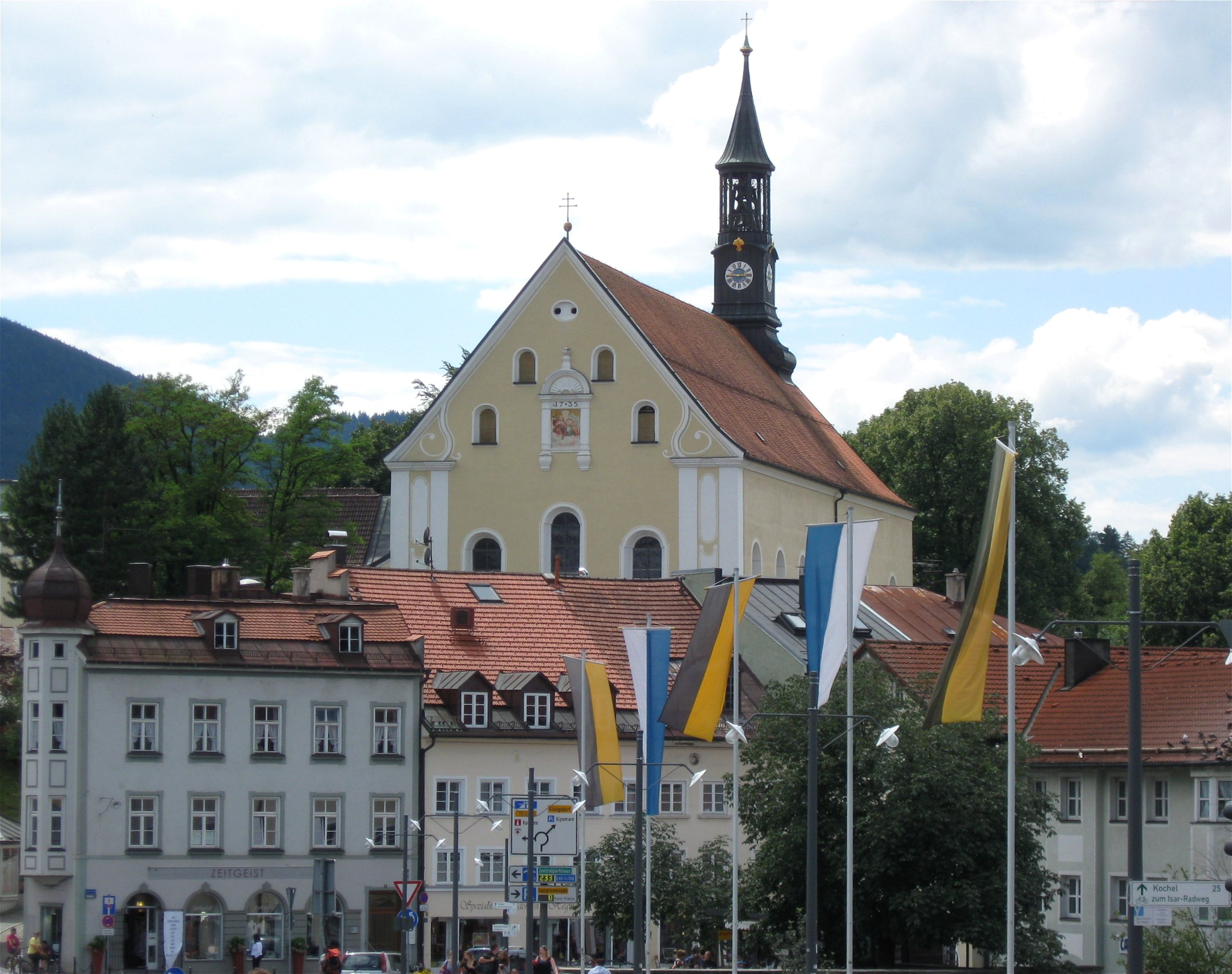 Franziskanerkloster; kath. Klosterkirche Hl. Dreifaltigkeit, barocker Wandpfeilersaal mit ausgeschiedenem Chor, Psallierchor und Dachreiter, von Aichardus Holzleithner, 1733-35; mit Ausstattung; Konventgebäude, dreigeschossige mehrflügelige Anlage mit Walmdächern, etwa gleichzeitig, später verändert; ehem. Friedhofsmauer, Mauer des 1922 aufgelassenen Friedhofs; Kriegergedenkstätte, Steinsarkophag zwischen steinernen kugelbesetzten Stehlen, 1927.